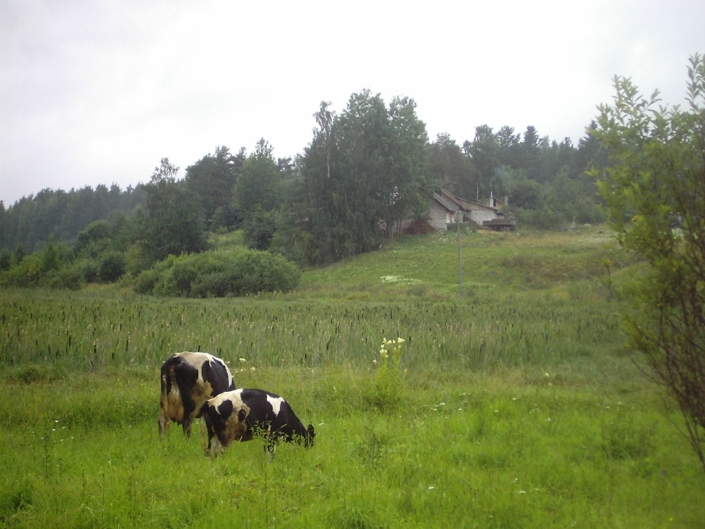 Лавиярви